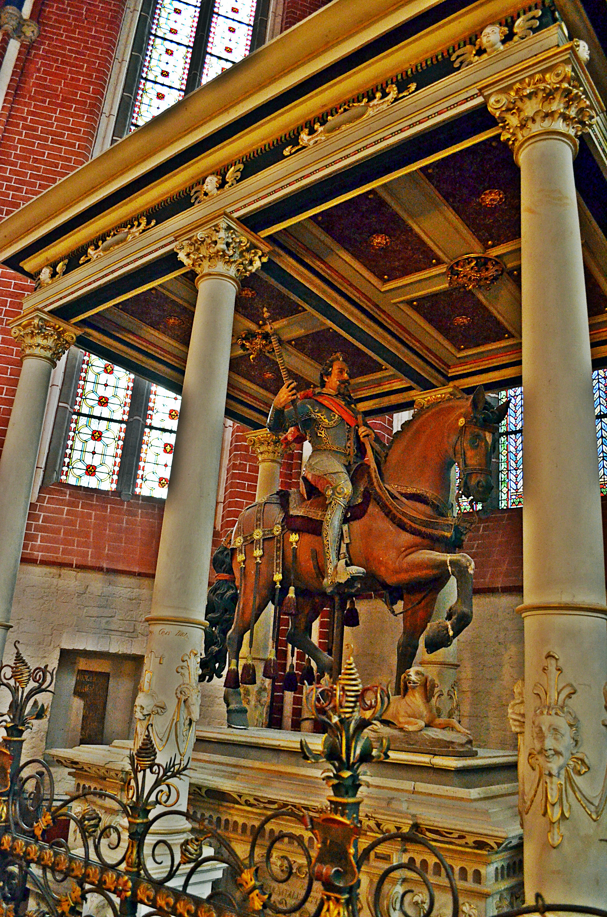 Bad Doberan, Münster, Grabanlage mit Reiterstandbild 2